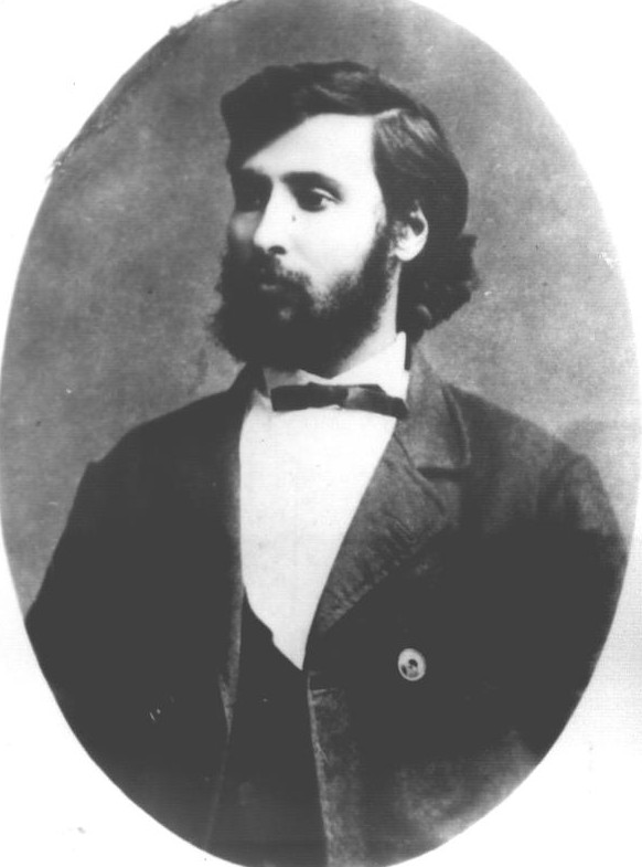 Атанас Узунов, български възрожденец